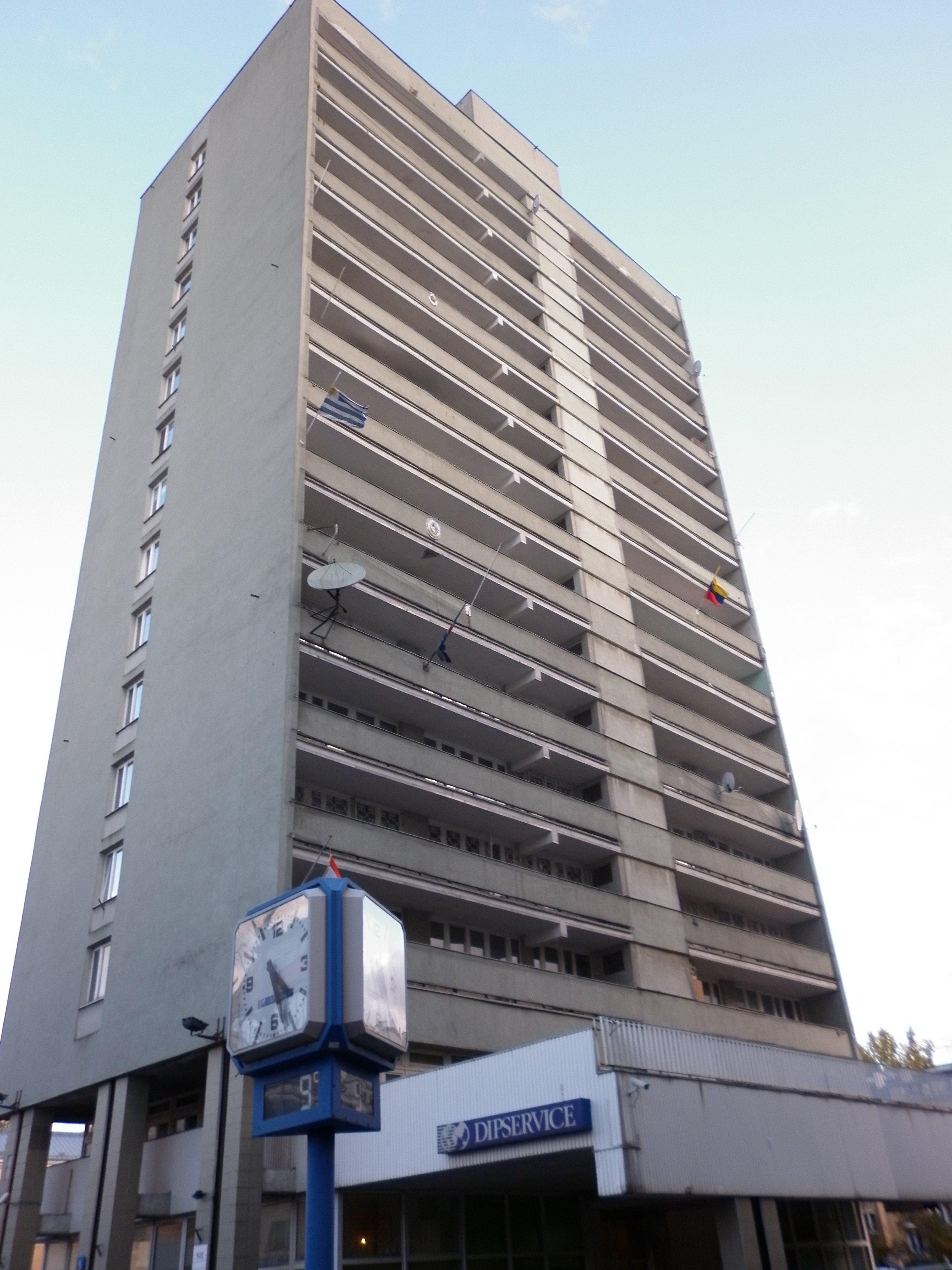 Ambasady Urugwaju i Ekwadoru